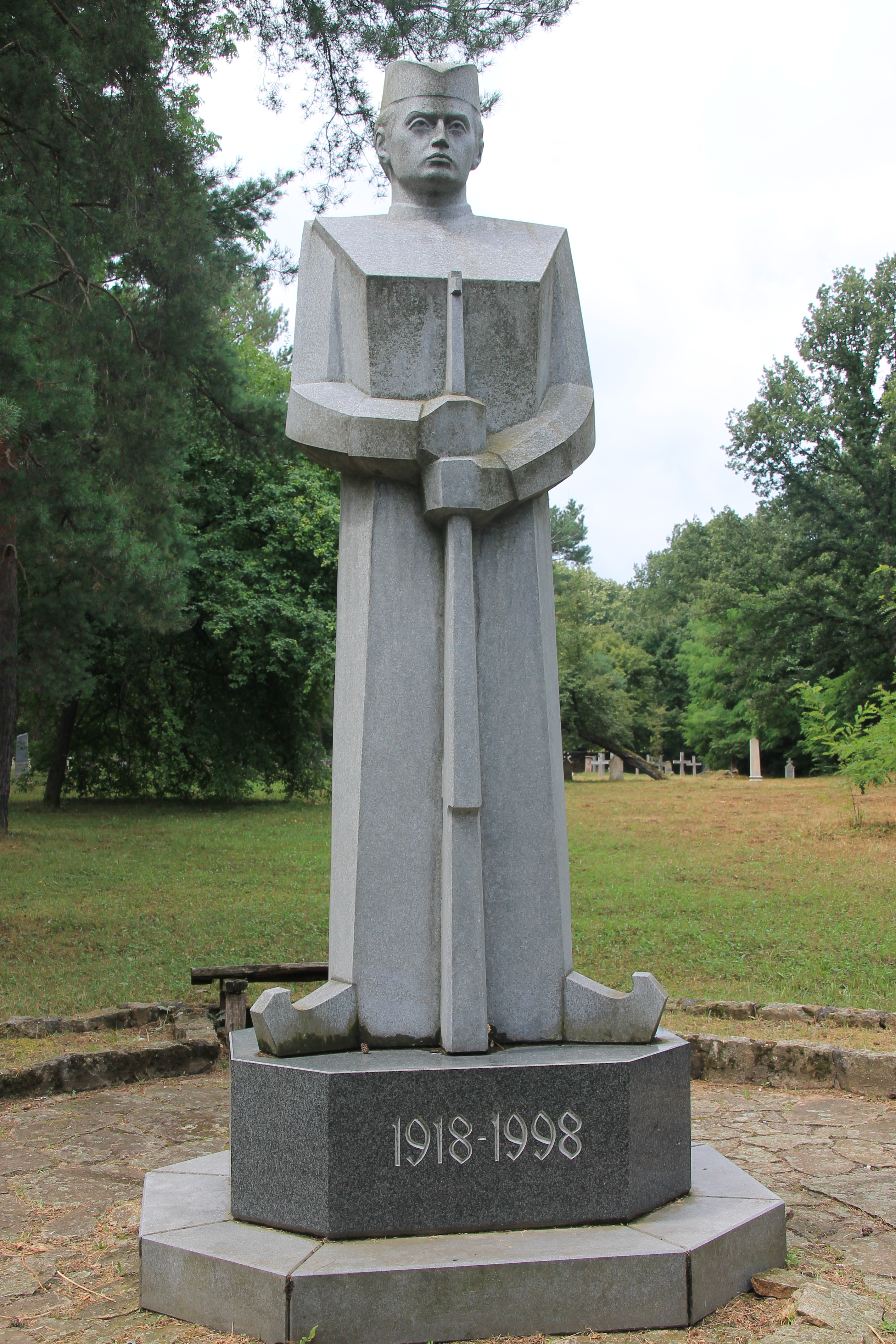 Staro vojničko groblje u Šumaricama